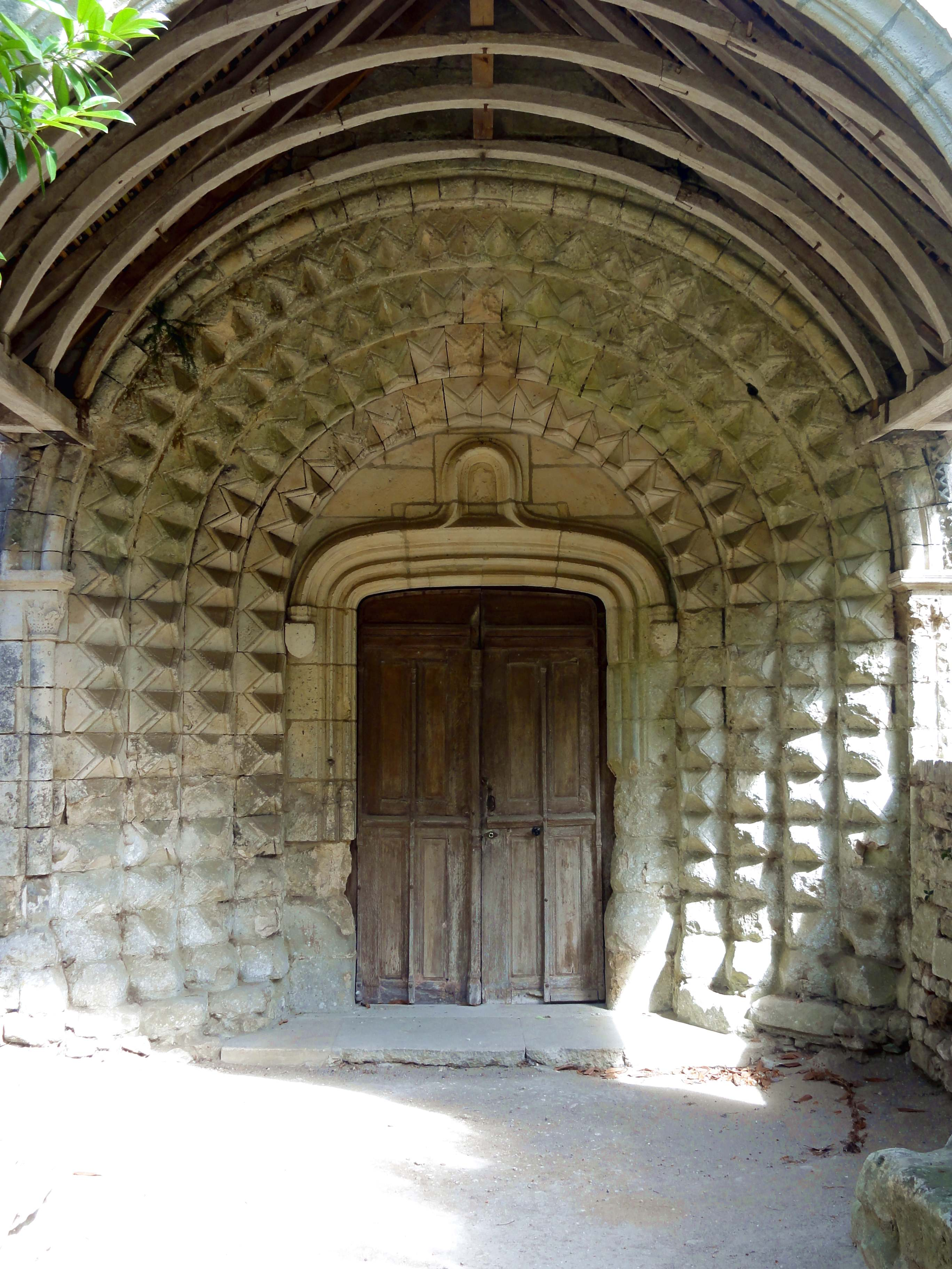 L'église Saint-Vaast ; portail en anse de panier à quadruple archivolte en pointe-de-diamant ou bâtons brisés, surmonté d'un gable.